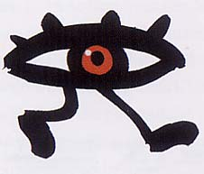 Das Laufende Auge